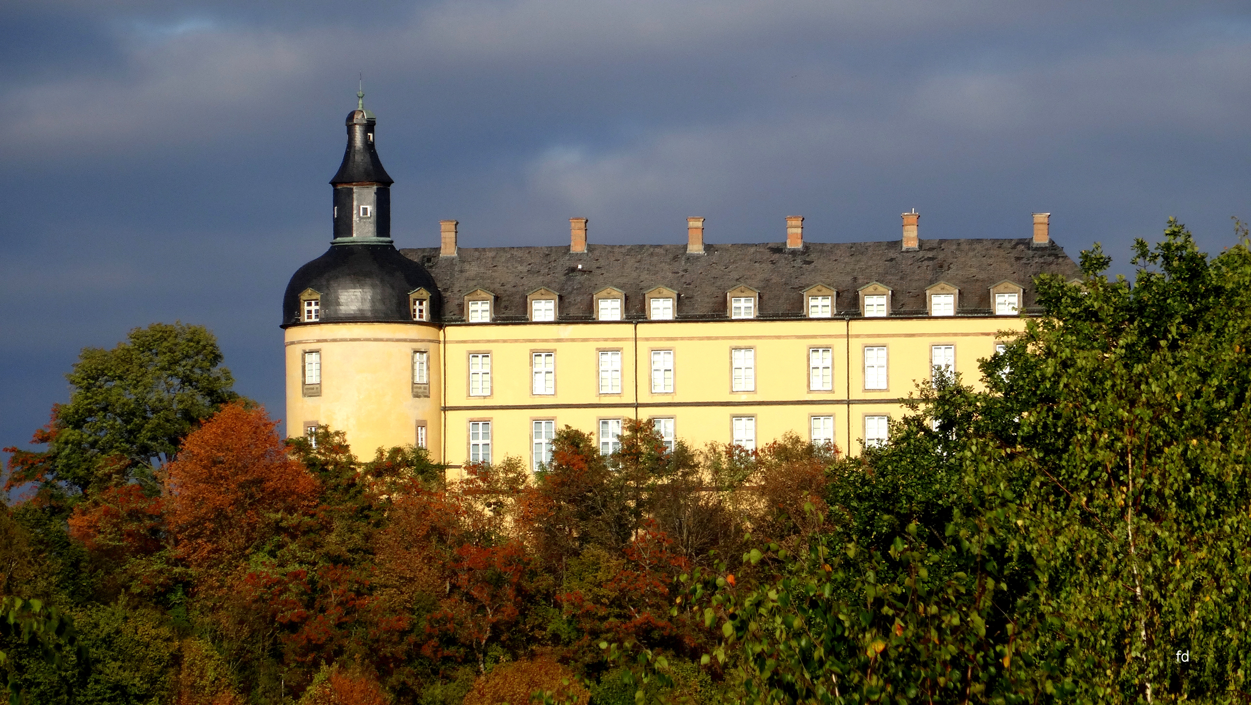 Barockschloss Friedrichstein Altwildungen